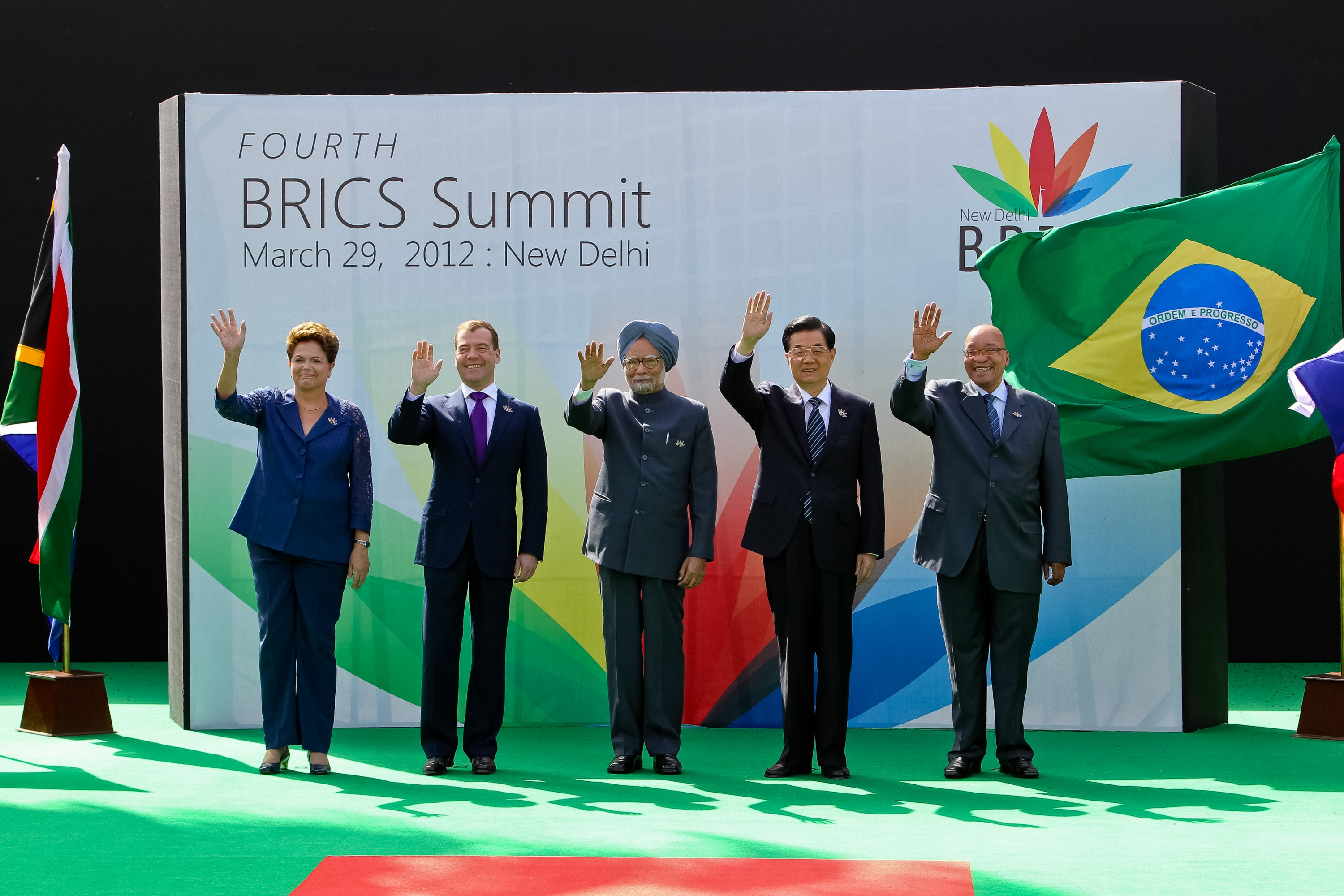 Nova Delhi, Índia - A presidenta Dilma Rousseff, o presidente Dmitri Medvedev (Rússia), o primeiro-ministro da Índia, Manmohan Singh, e os presidentes Hu Jintao (China), e Jacob Zuma (África do Sul) durante foto oficial da 4ª Cúpula do Brics (Brasil, Rússia, Índia, China e África do Sul), na Índia.